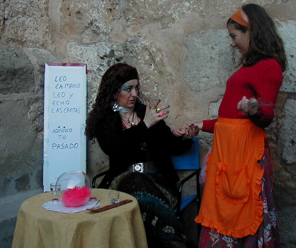 La María Francisca echando las cartas. Carnaval de Tarazona de la Mancha (Albacete)